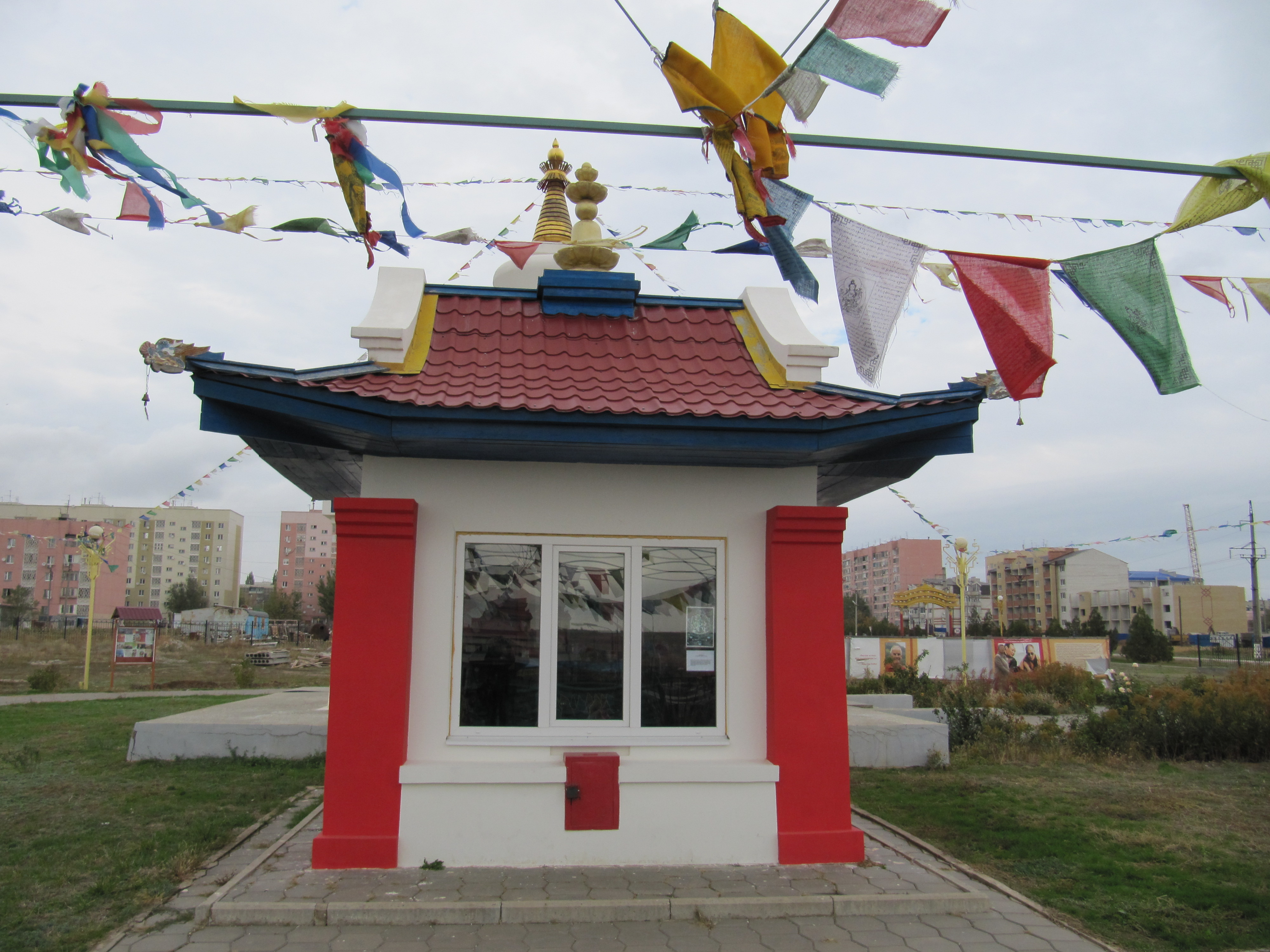 Павильон возле Элистинской ступы Просветления, Элиста, Калмыкия